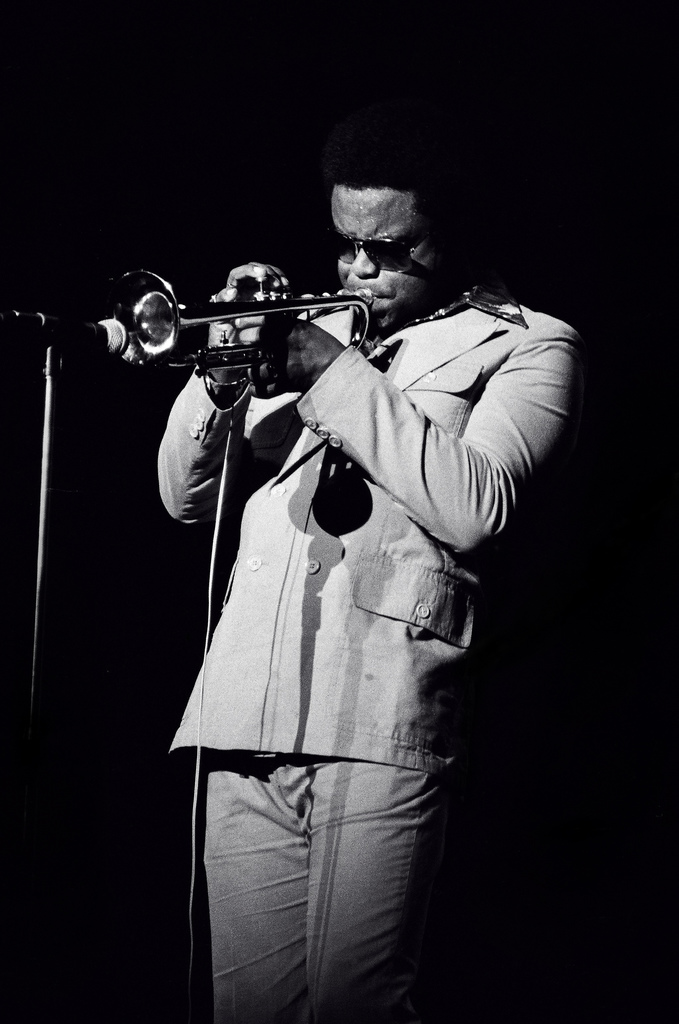 Freddie Hubbard Rochester N.Y. 1976